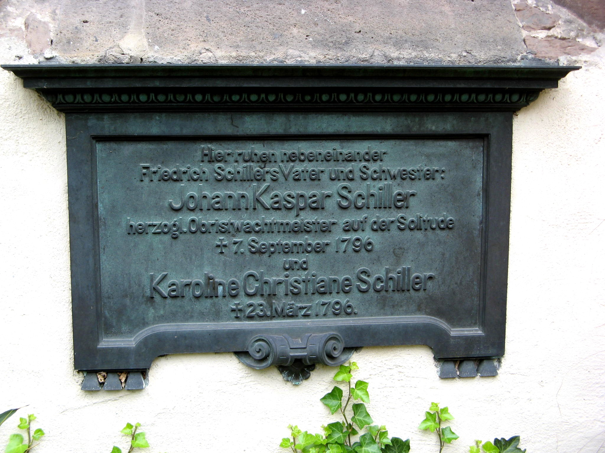 Johann Caspar Schillers Grab in Gerlingen